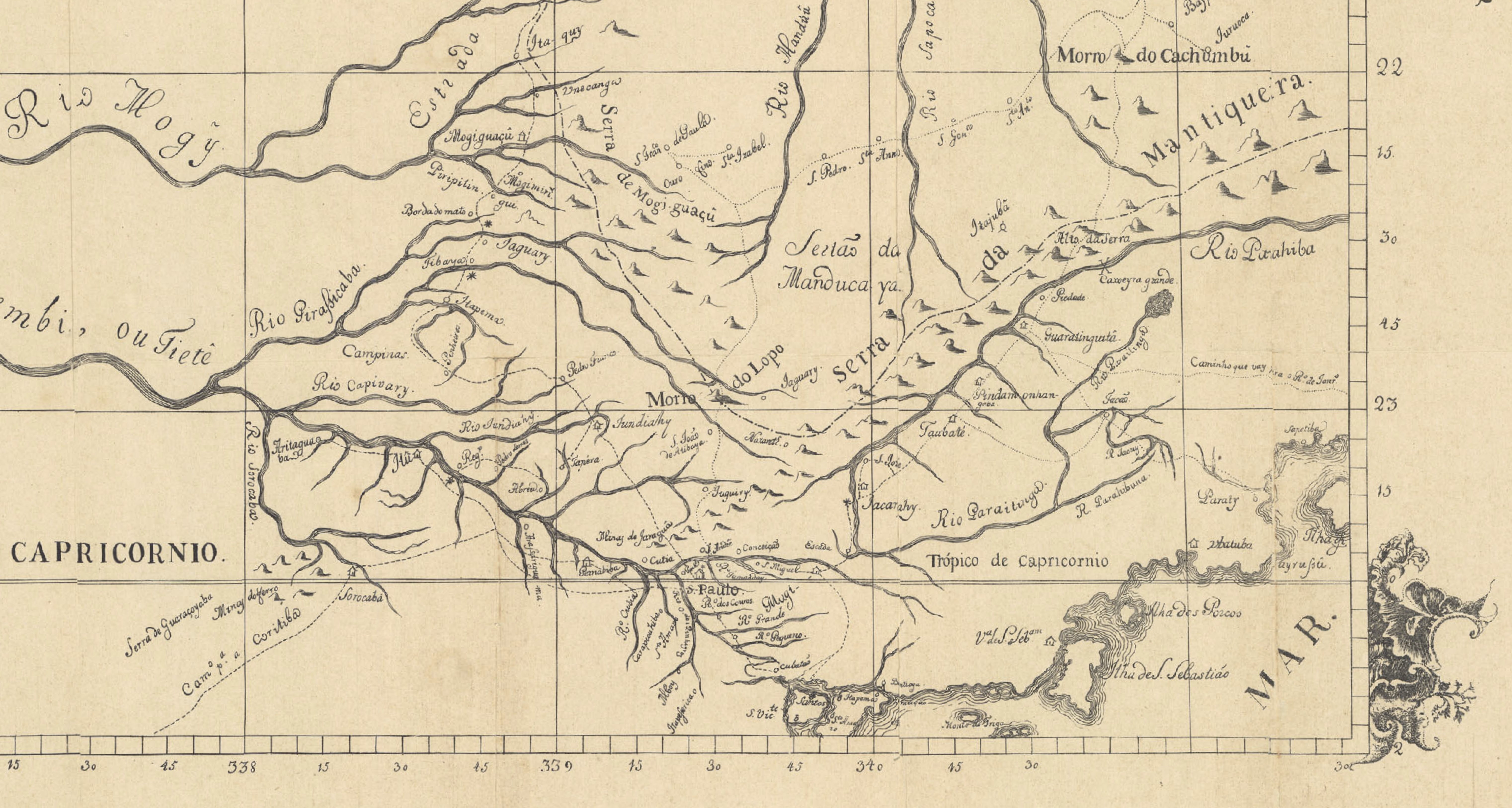 Carta chorographica da Capitania de S. Paulo, em que se mostra a verdadeira cituação dos lugares por onde se fizerão as sete principaes divizoens do seu governo com o de Minas Geraes (cropped)